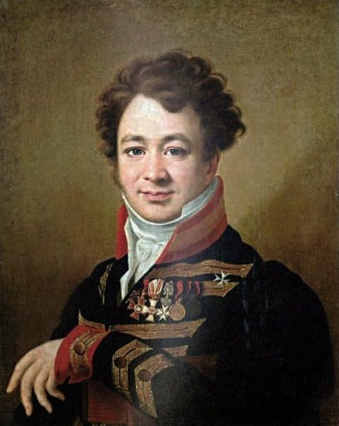 Дмитрий Николаевич Бантыш-Каменский (1778-1850)